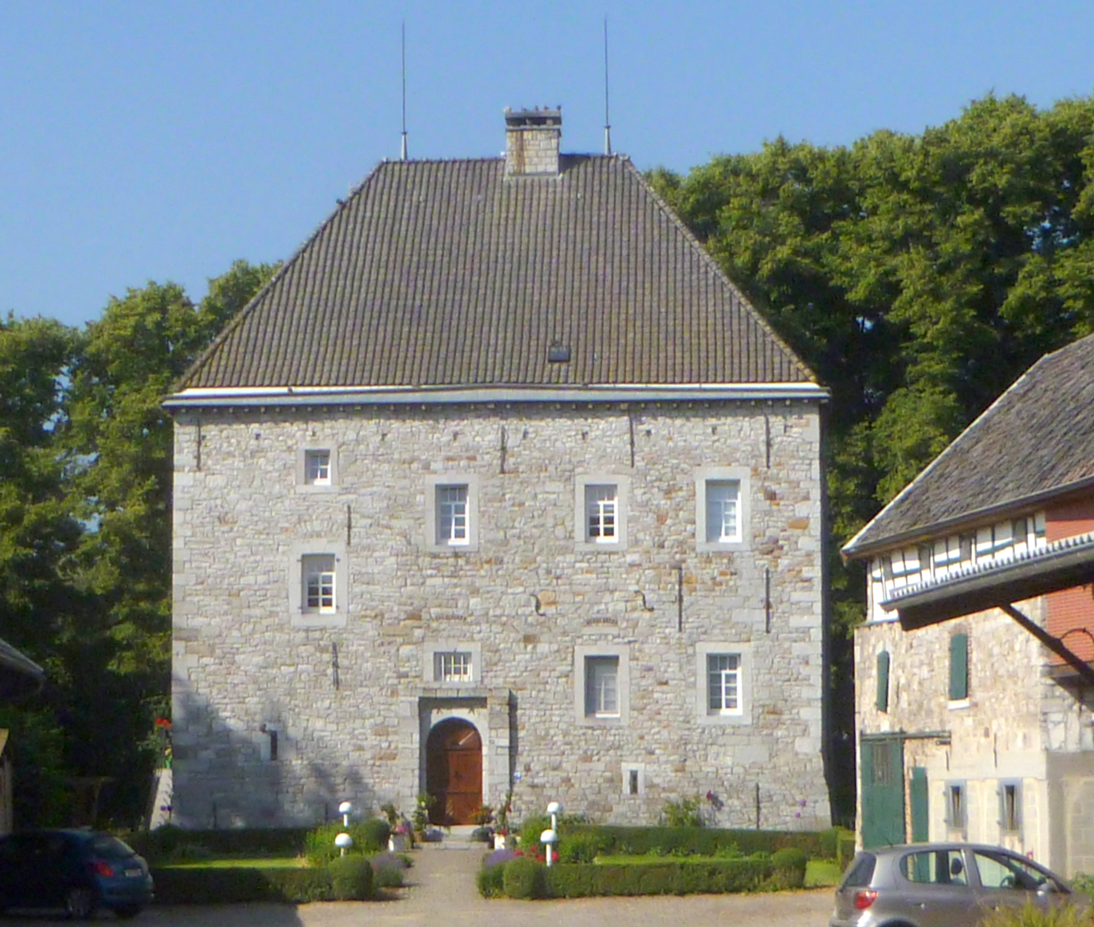 Herrenhaus Gut Weims, Kettenis/Belgien